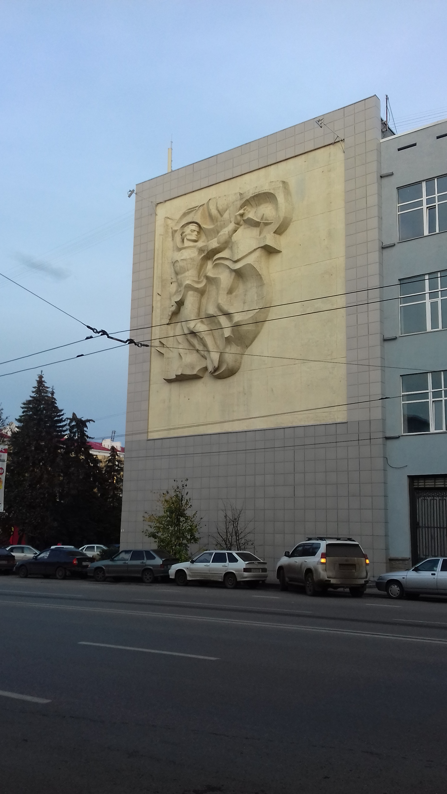 Улица Карла Маркса 12к7 в городе Уфа, Башкортостан, Россия (здание Уфимского государственного авиационного технического университета (УГАТУ)) - вид со стороны улицы Карла Маркса